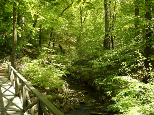 Pålsjö forrest in Helsingborg